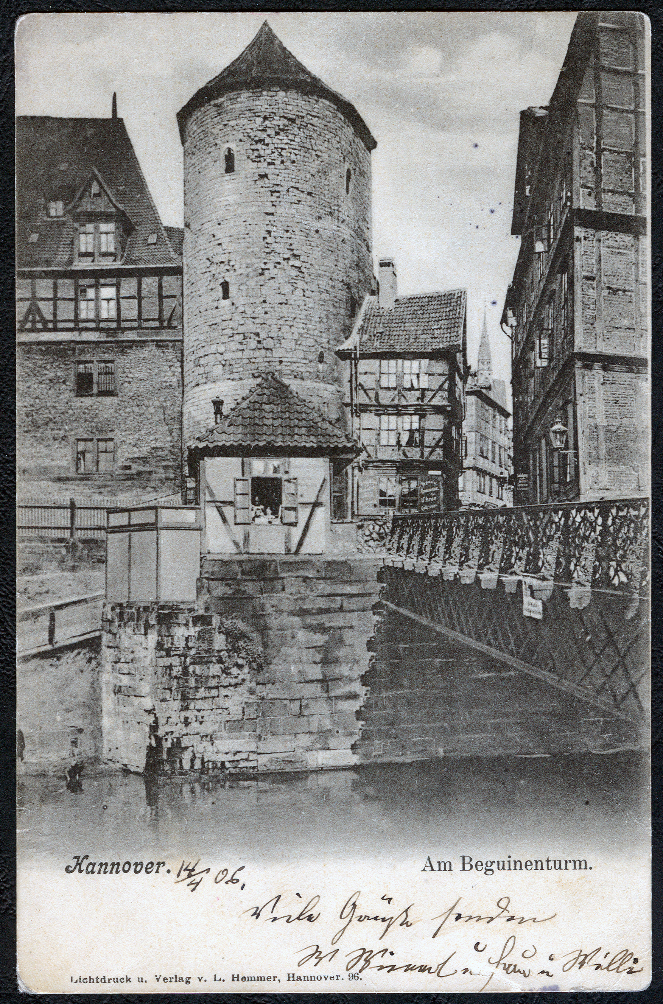 Die Ansichtskarte von Ludwig Hemmer mit der zugedruckten Nummer "98" zeigt den Beginenturm in einer Aufnahme um 1900. Auffallend ist das erkennbare Auseinanderstreben der Steinquader in den oberen Etagen des Turmes. Rechts an den Turm angebaut ist ein Fachwerkhaus, dessen Dachabdruck man noch heute am Beginenturm erkennen kann. Links am Turm steht das bis 1649 angebaute Zeughaus mit einem Aufbau aus Fachwerk und einem Steildach darüber. Der Fotograf hatte sich auf der Leineinsel postiert (heute der Parkplatz am Flohmarkt). Die Brücke mit aufwendig verzierter Brüstung führte in direkter Verlängerung in die Pferdestraße. Vor dem Beginenturm ist ein kleines Häuschen zu sehen, aus dem drei Personen interessiert herüberschauen. Links daneben führte ein Weg schräg hinab zur Pferdeschwemme in die Leine, in der die Besitzer von Pferden ihre Tiere tränken und baden konnten. Für diese Menschen war offensichtlich das Schild gedacht, das oberhalb der Leine in der Mitte der Brücke zu erkennen ist. Ganz rechts im Bild ist ein dreigeschossig auskragendes Fachwerkhaus zu sehen; an seiner Stelle wurde nach dem Zweiten Weltkrieg der Klostergang und die Rademachertreppe erbaut. Dort finden sich heute die Aussenanlagen unterschiedlicher Gastronomien bzw. die Ausstellungen von Künstlern während des Flohmarkts, der jeden Samstag hier abgehalten wird.